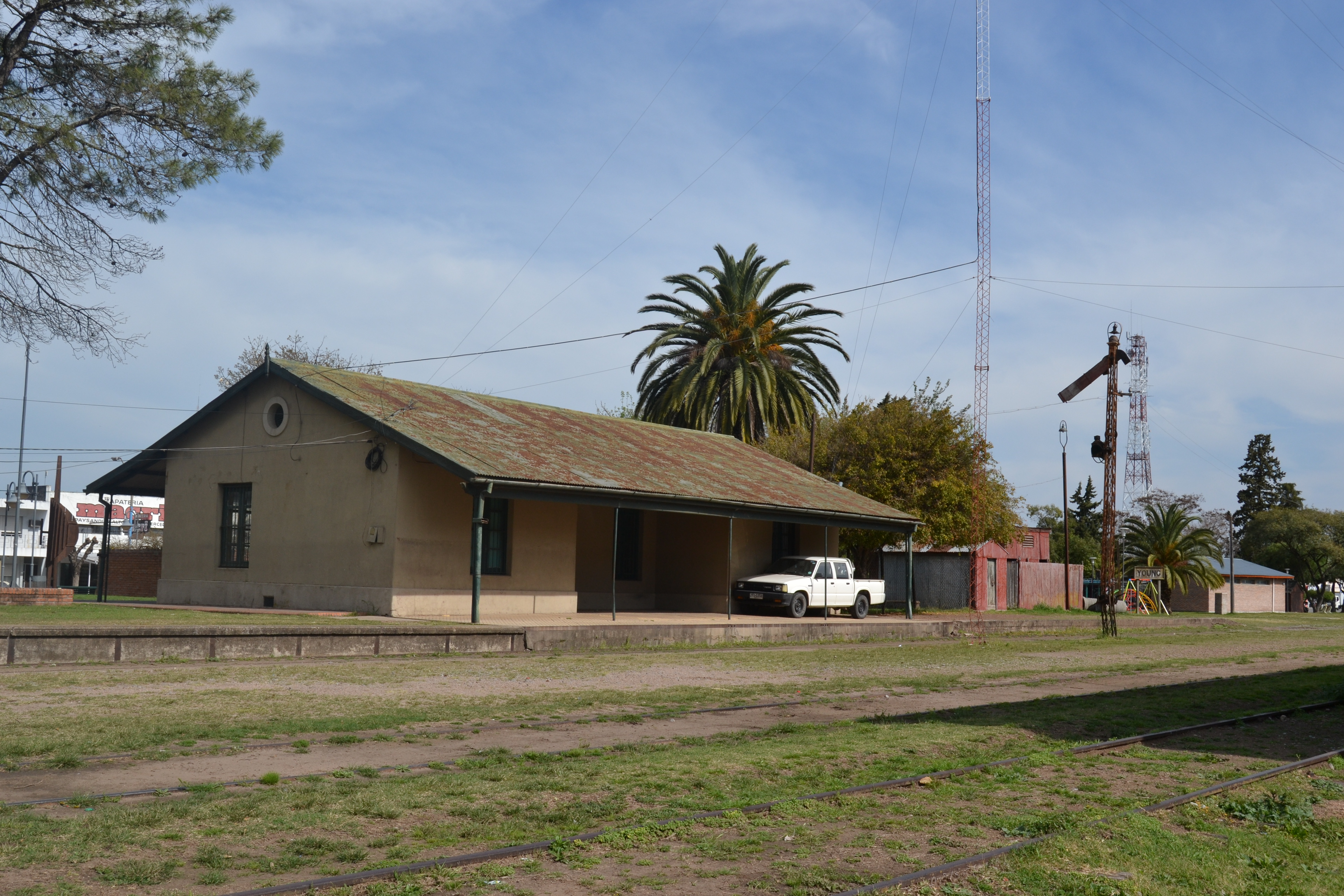 Estacion de AFE. Ubicada en el departamento de Río Negro